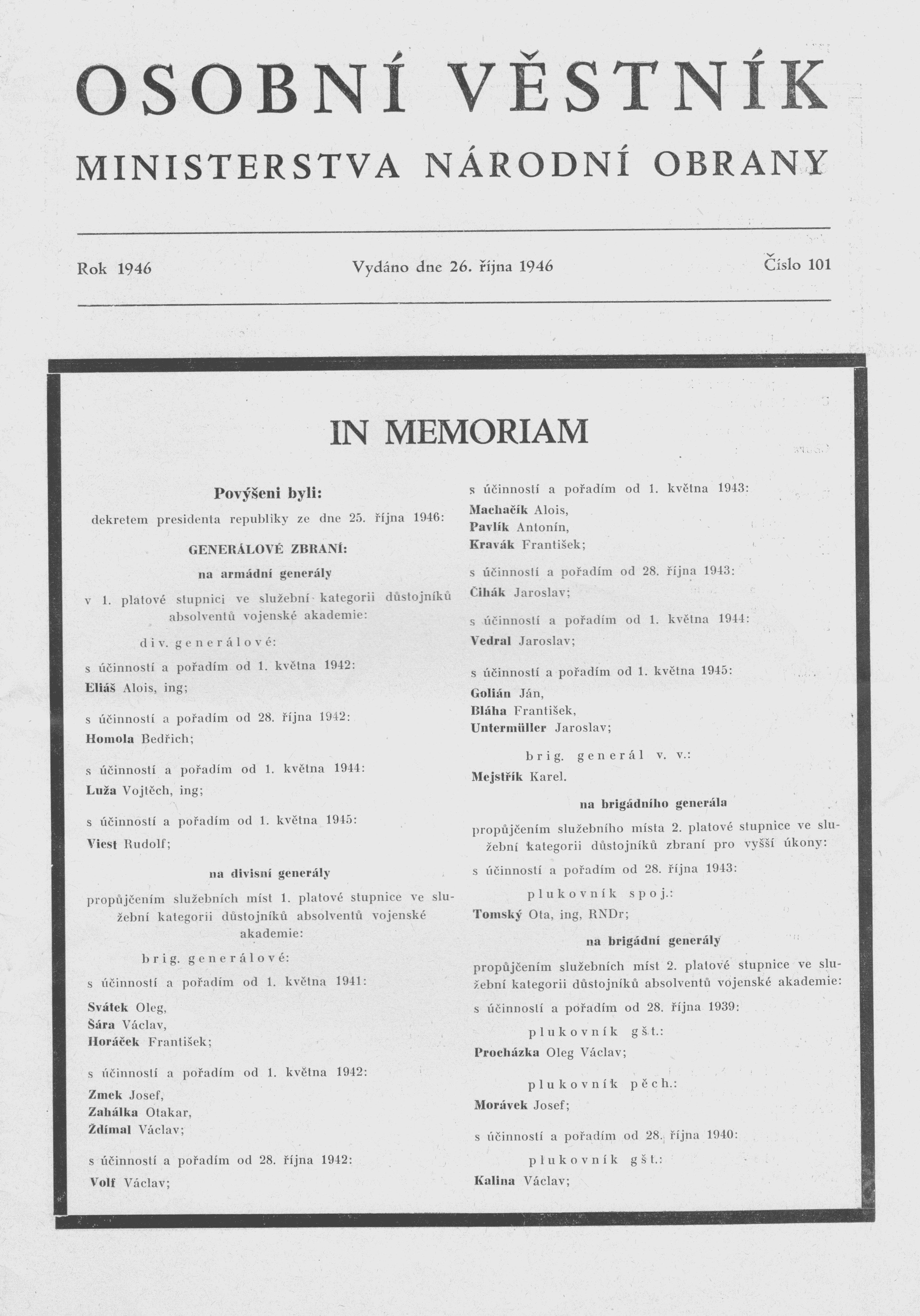 Titulní strana Osobního věstníku MINISTERSTVA NÁRODNÍ OBRANY číslo 101 ze dne 26. října 1946: IN MEMORIAM Povýšeni byli: dekretem presidneta republiky ze dne 25. října 1946 generálové zbraní: ... na brigádní generály propůjčením služebních míst 2. platové stupnice ve služební kategorii důstojníků absolventů vojenské akademie: ... (na stránce 1204) s účinností a pořadím od 1. května 1942 ... plukovník generálního štábu Churavý Josef; ... Titulní strana tohoto věstníku obsahuje explicitně a jmenovitě uvedené povýšení na armádní generály pro: Eliáš Alois, Ing.; Homola Bedřich; Luža Vojtěch Ing.; Viest Rudolf; Titulní strana tohoto věstníku obsahuje explicitně a jmenovitě uvedené povýšení na divizní generály pro: Svátek Oleg; Šára Václav; Horáček František; Zmek Josef; Zahálka Otakar; Ždímal Václav; Volf Václav; Macháček Alois; Pavlík Antonín; Kravák František; Čihák Jaroslav; Vedral Jaroslav; Golián Ján; Bláha František; Untermüller Jaroslav; Mejstřík Karel; Titulní strana tohoto věstníku obsahuje explicitně a jmenovitě uvedené povýšení na brigádní generály pro: Tomský Ota, Ing. RNDr.; Procházka Oleg Václav; Morávek Josef; Kalina Václav; Na poslední straně věstníku zcela dole je podepsán: armádní generál Ludvík Svoboda, vlastní rukou, ministr národní obrany.